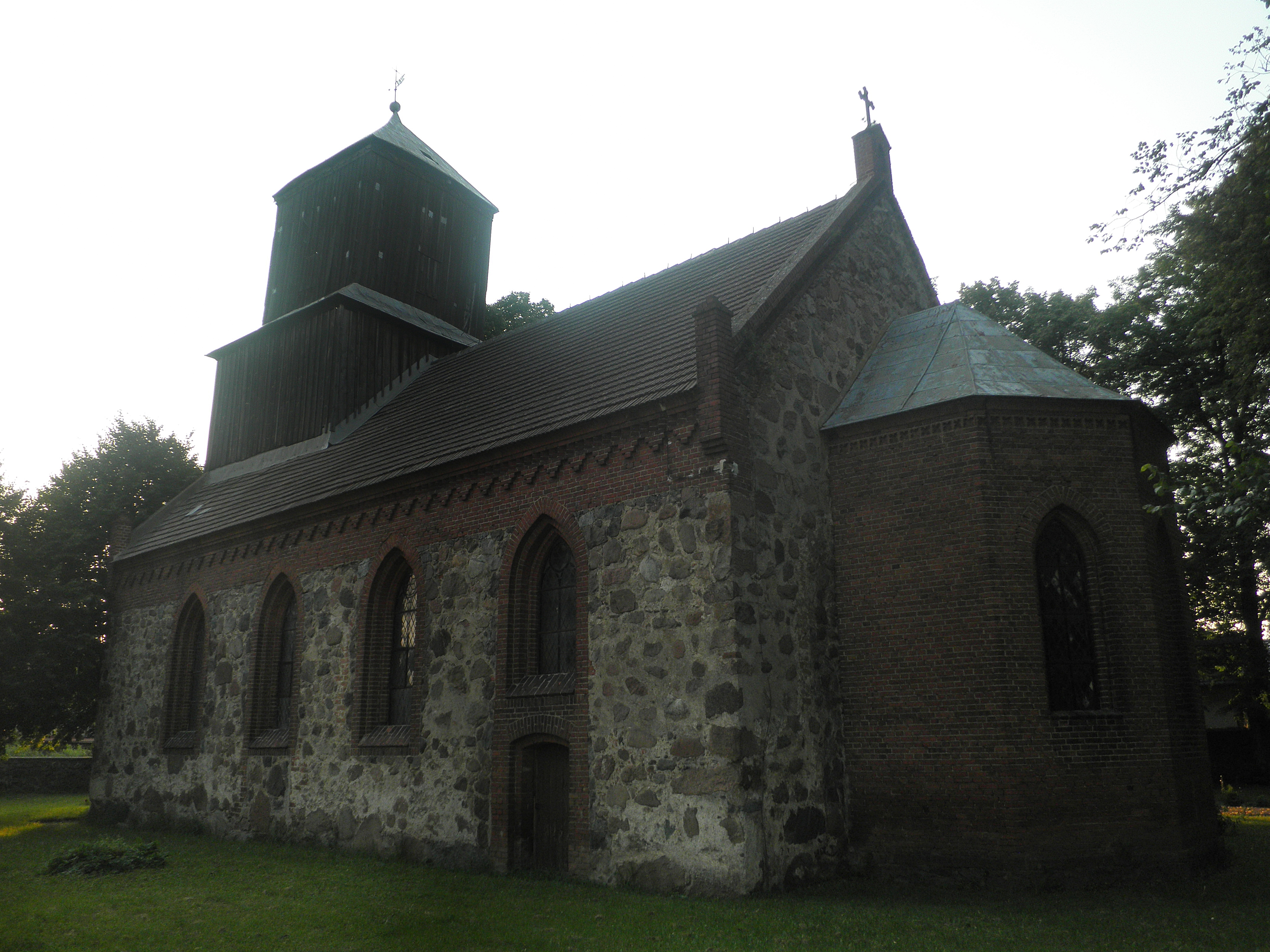 Kunowo - rzymskokatolicki kościół filialny p.w. św. Wojciecha, XIV/XV, 1850, 1871